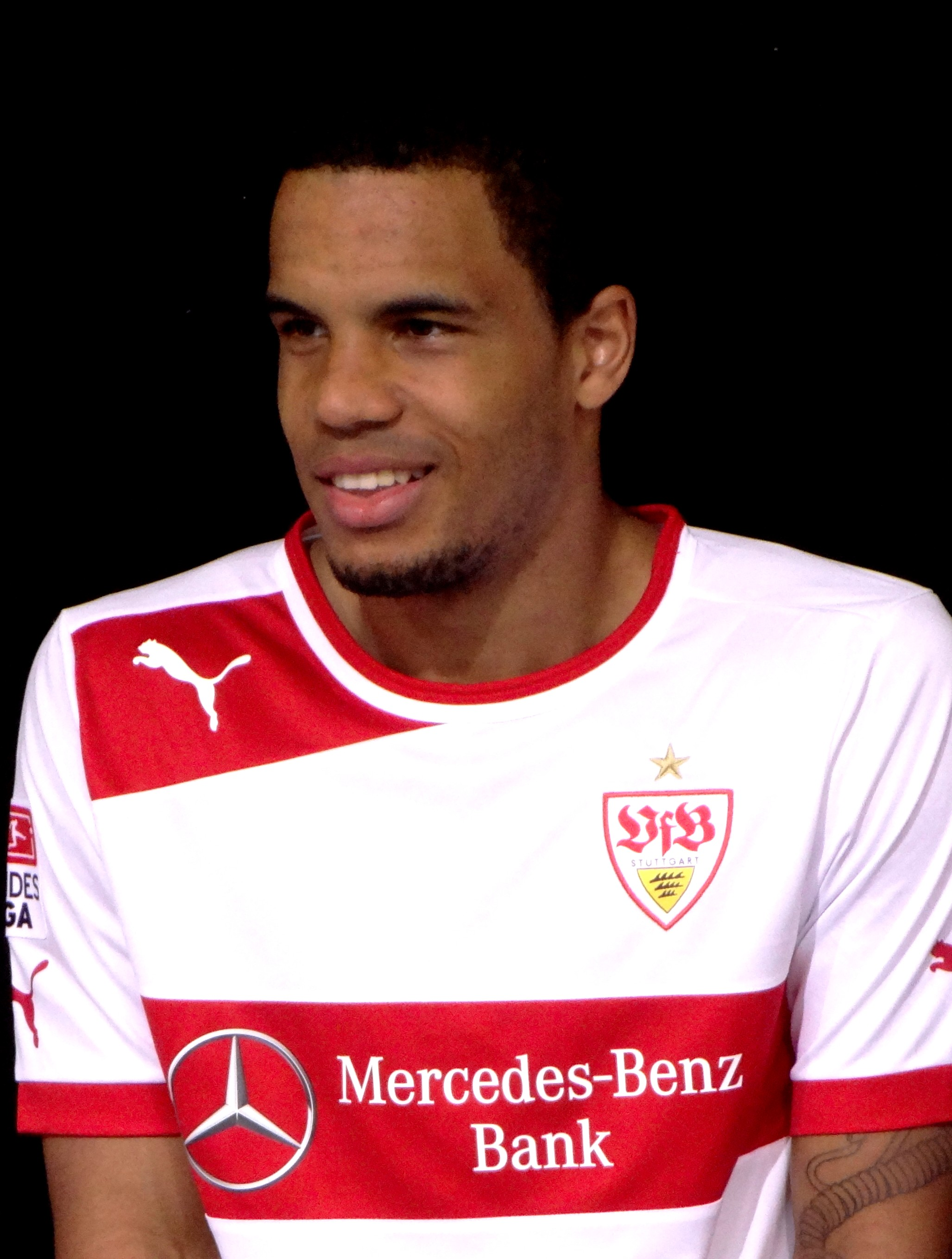 Daniel Didavi beim Saison Opening 2012. Aufgenommen von